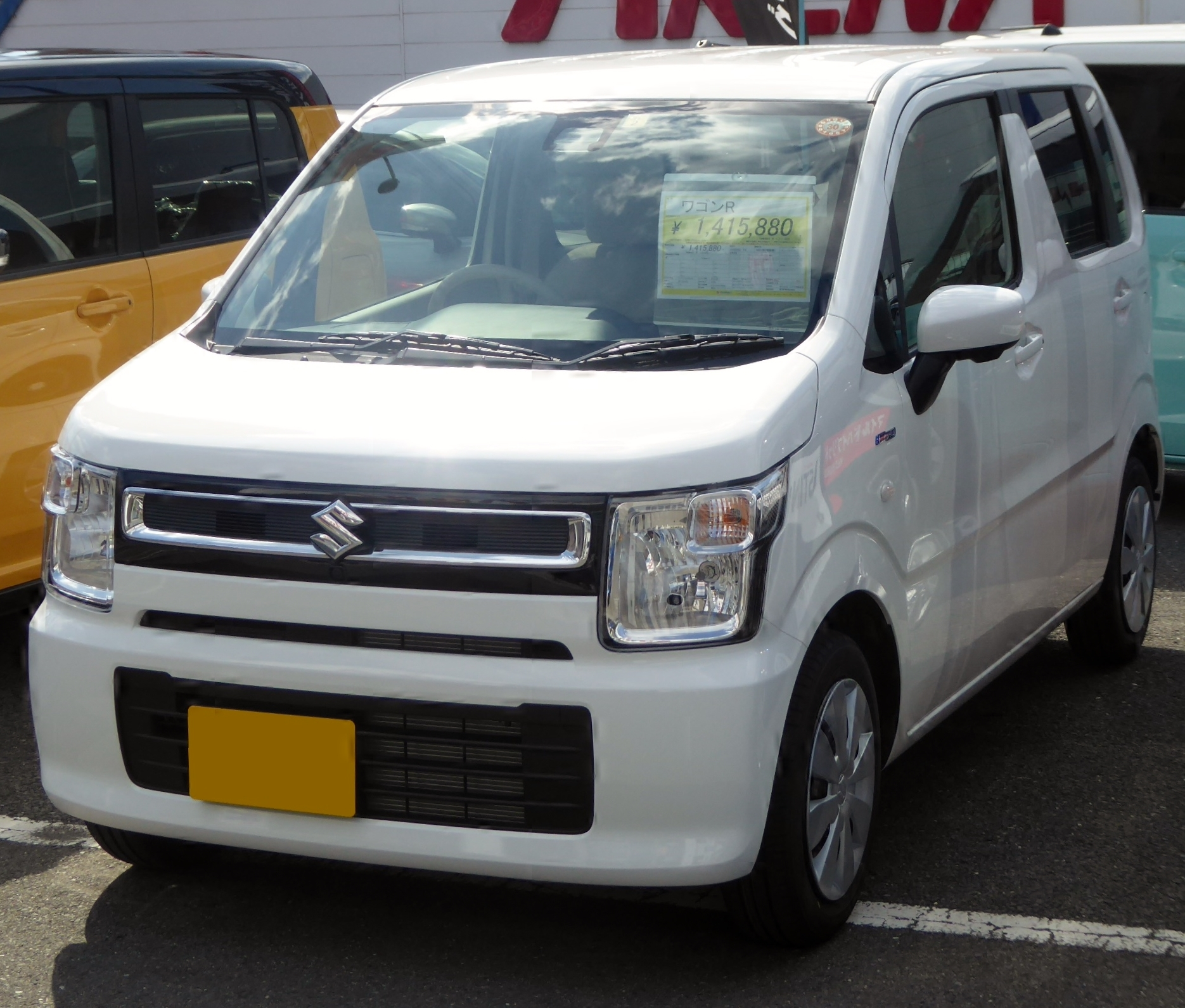 DAA-MH55S型スズキ・ワゴンR HYBRID FXをフロントから撮影。